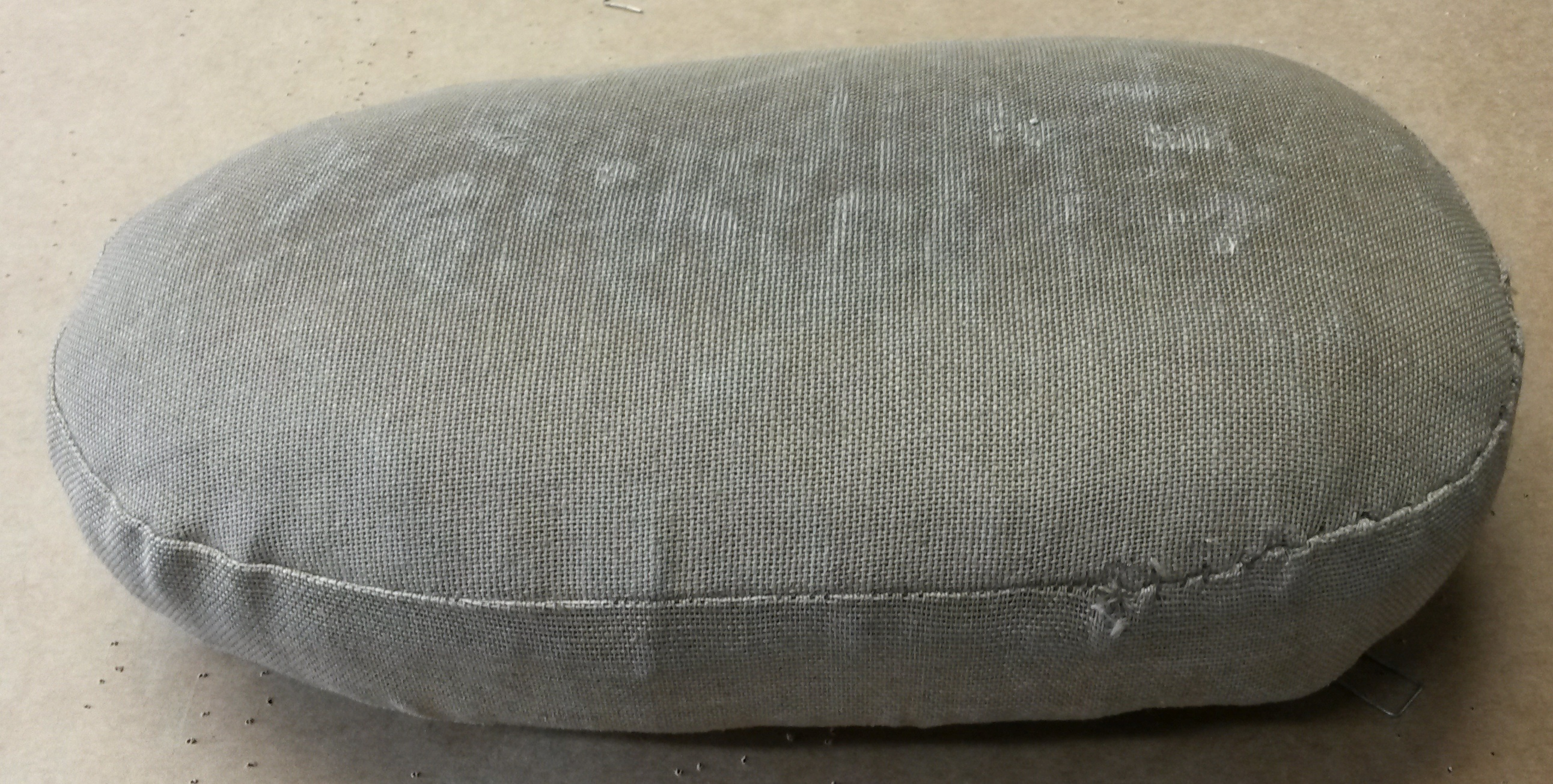 Schneider-Bügelkissen. Gesehen in der Kürschnerei Manufaktur Halfmann, Düsseldorf.